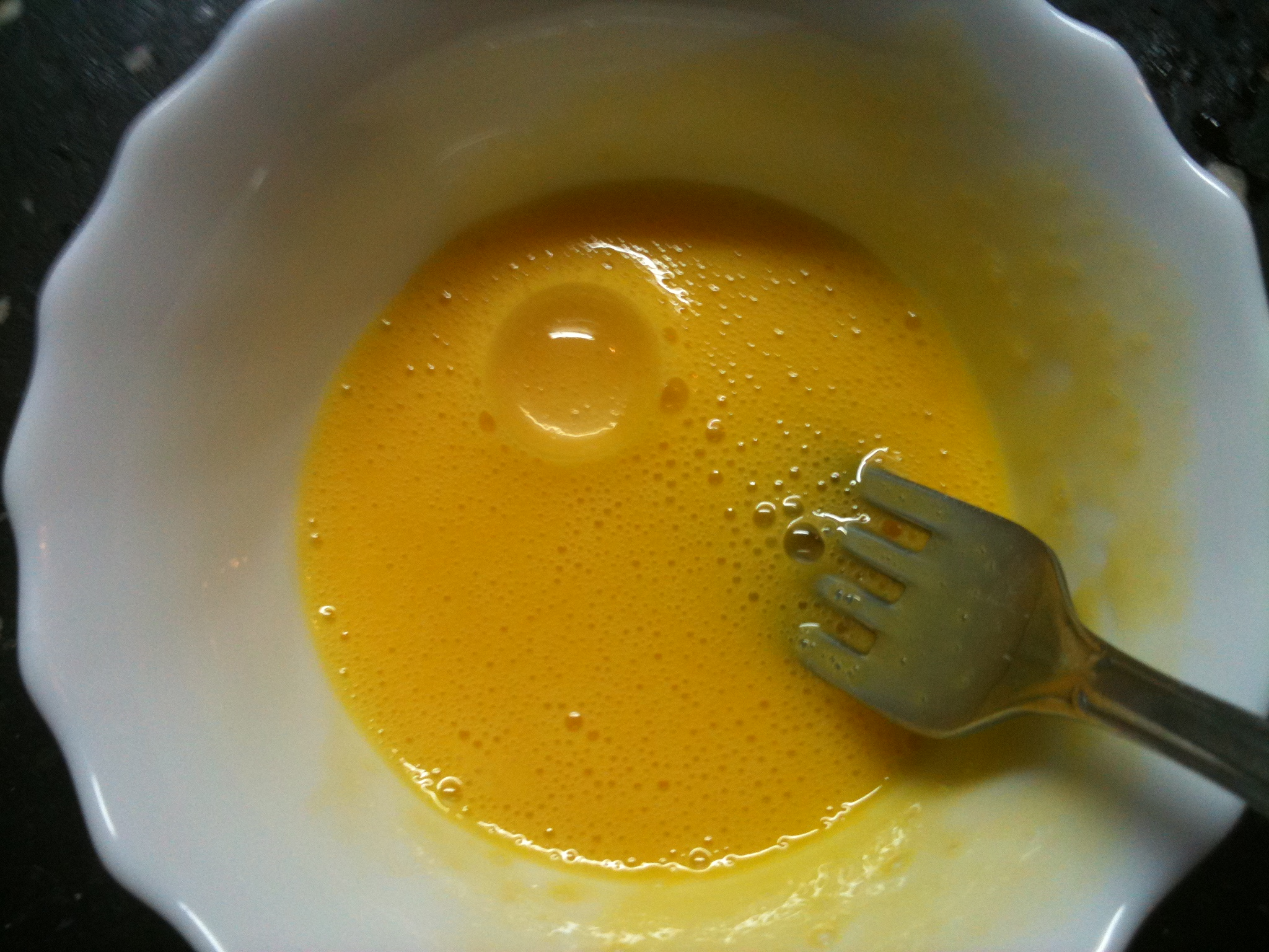 Tres yemas de huevo de gallina batidas con un tenedor.